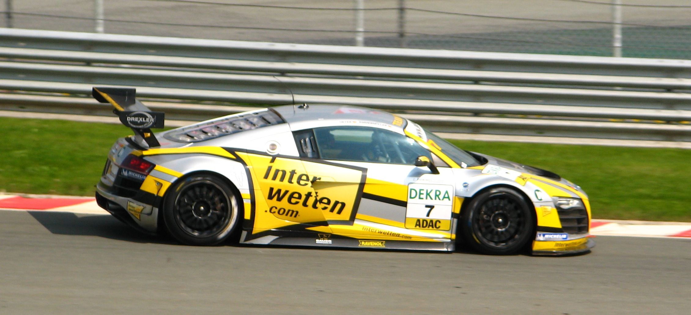 Michael Ammermüller, Team Rosberg (Audi R8 LMS GT3)